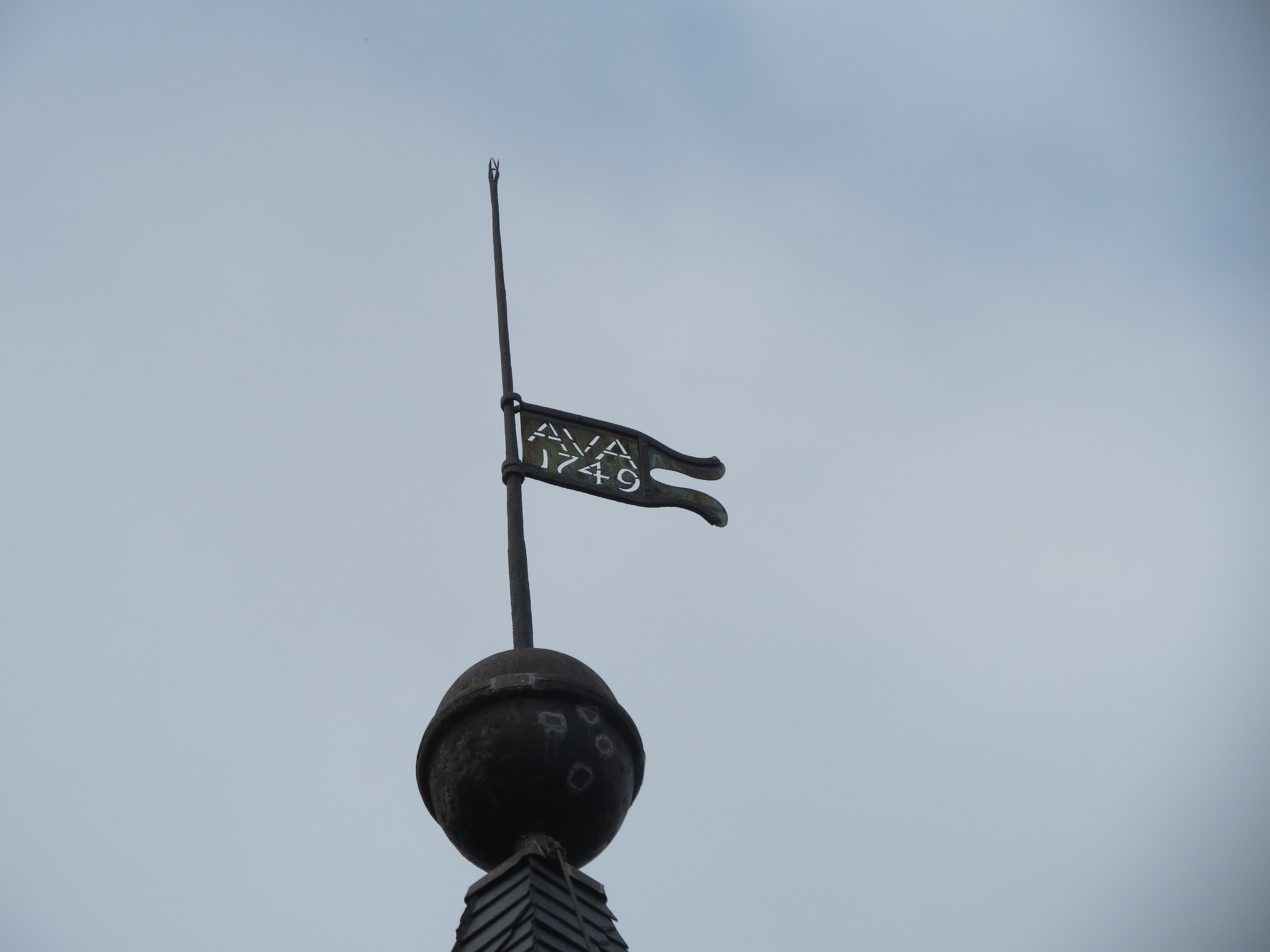 Dorfkirche Neu-Temmen, Windfahne, Neu-Temmen, Gem. Temmen-Ringenwalde, Lkr. Uckermark, Brandenburg